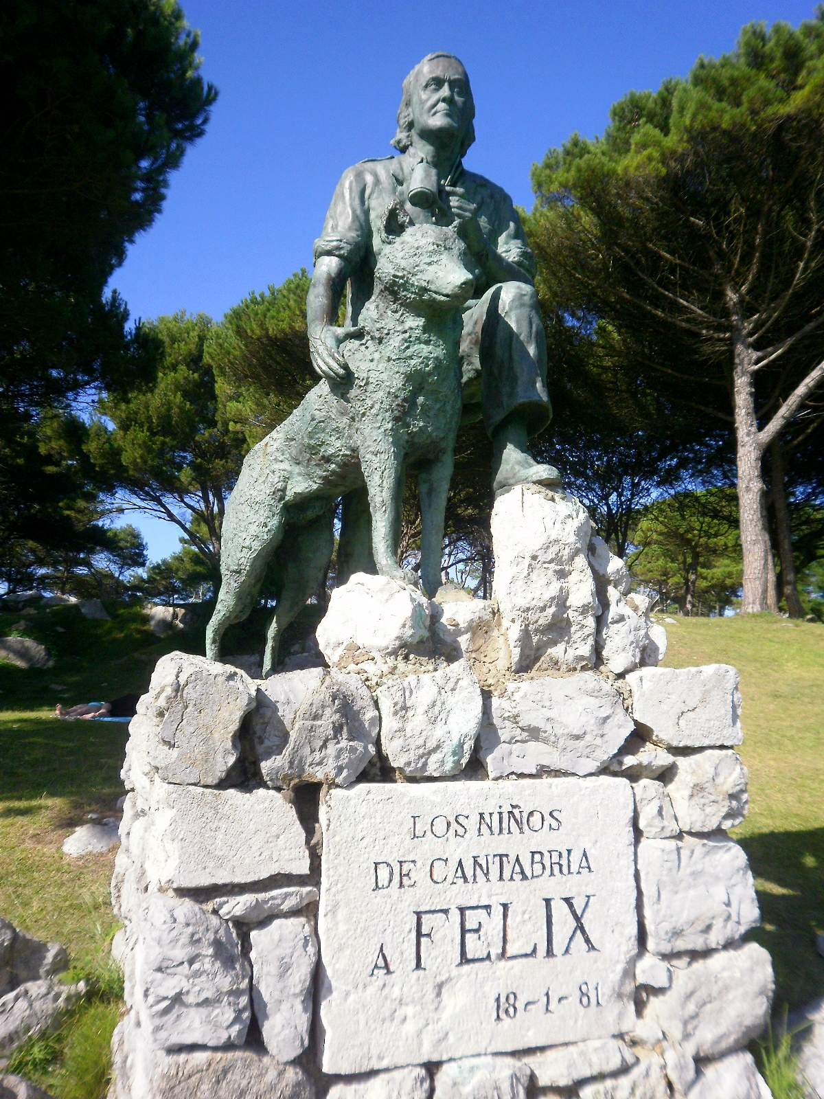 Monumento a ´Félix Rodríguez de la Fuente en los jardines de la Península de la Magdalena, en Santander (Cantabria)